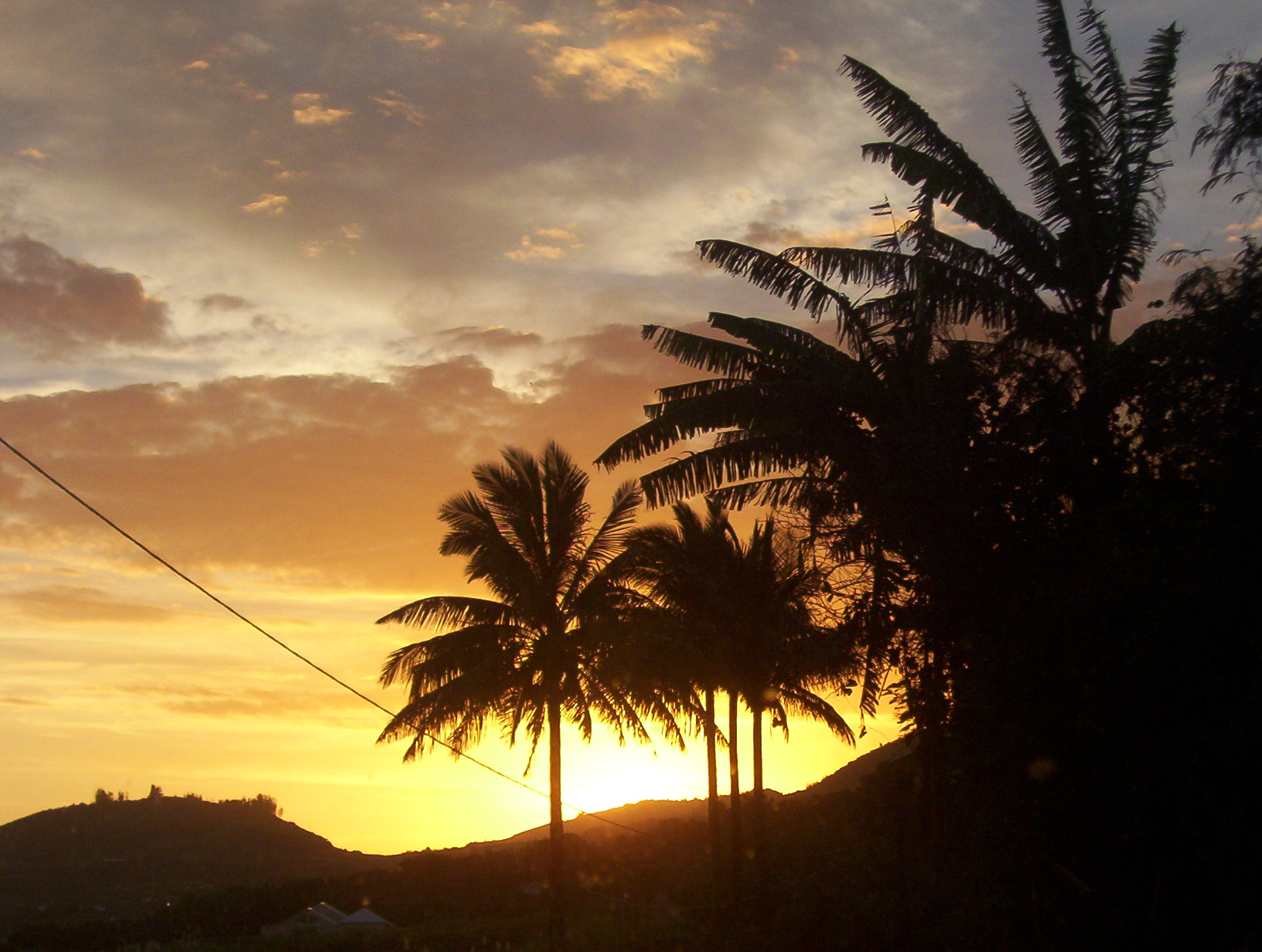 Photo d'un coucher de soleil Crépuscule à l'ile de la Réunion Photo perso, licence libre